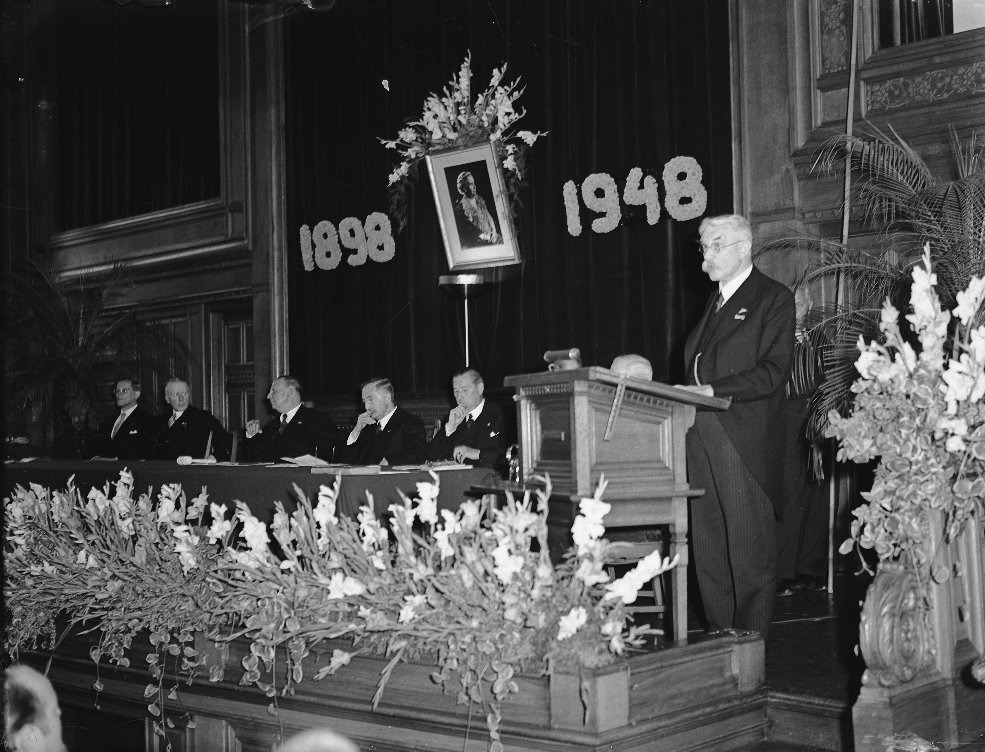 50-jarig regeringsjubileum koningin Wilhelmina. Wetenschappelijk Appèl in de aula van het Indisch Instituut in Amsterdam (bestond ook 50 jaar). De ontwikkelingen van vier takken van wetenschap in de afgelopen 50 jaar worden belicht door vier hoogleraren op het gebied van: Natuur (prof. C. [Gerrit] van Iterson -staand), Cultuur (prof. C.C. Berg), Economische en Medische wetenschappen in de tropen (resp. prof. Egbert de Vries en prof. N.H. Swellengrebel). 1 september 1948